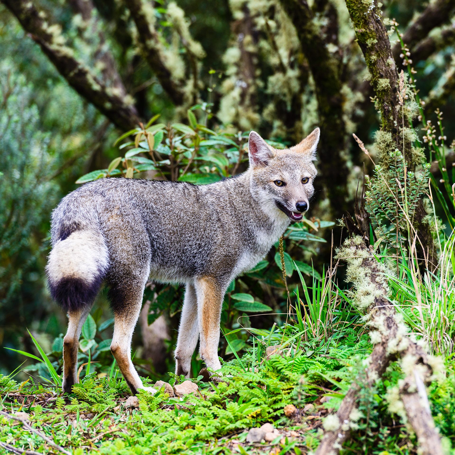 Graxaim ou Pampas Fox fazendo pose